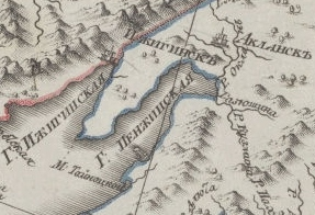 Фрагмент карты Восточная часть Иркутской губернии с прилегающими островами и западным берегом Америки. Ориентировочно 1802 год. Создатель гравюры - Савинков, Александр Дмитриевич - (1769-?), гравер, словорез, издатель, работал в Депо карт под руководством А. М. Вильбрехта (левый нижний угол карты). А. Д. Савинков вместе с военным топографом Ф. И. Позняковым занимался составлением и изданием карт и атласов.